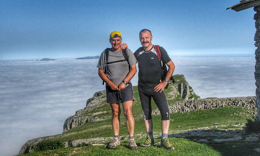 Joan Mari Torrealdai eta Mikel Arrizabalaga Beriain mendiko ermita parean, sakana osoa lainotan dagoela